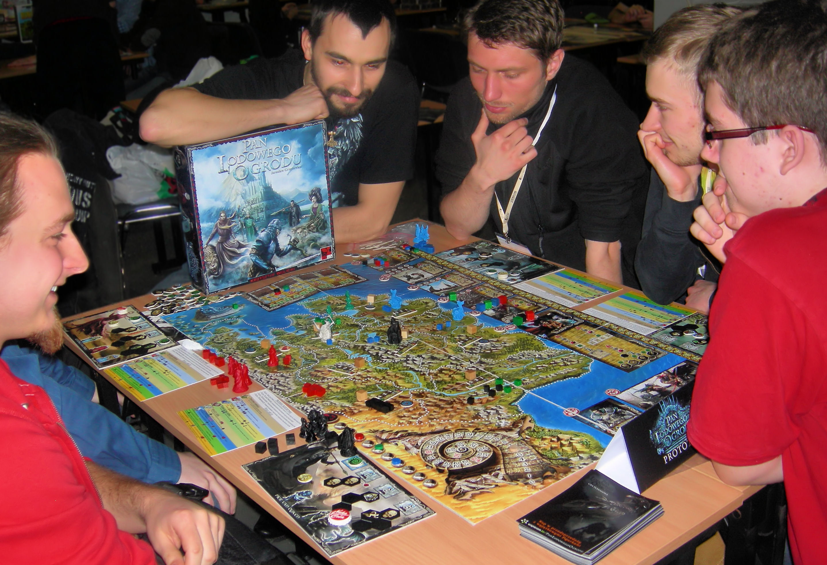 Prototyp gry planszowej Pan Lodowego Ogrodu na Festiwalu Fantastyki Pyrkon